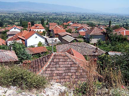 Поглед на с. Вељуса, Струмичко